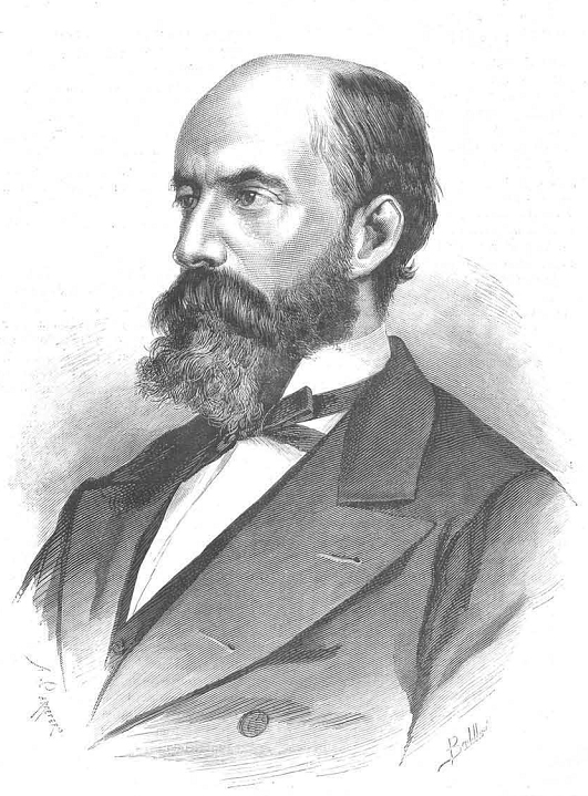 Retrato de Eduardo Saavedra, recogido en la revista española La Ilustración Española y Americana.